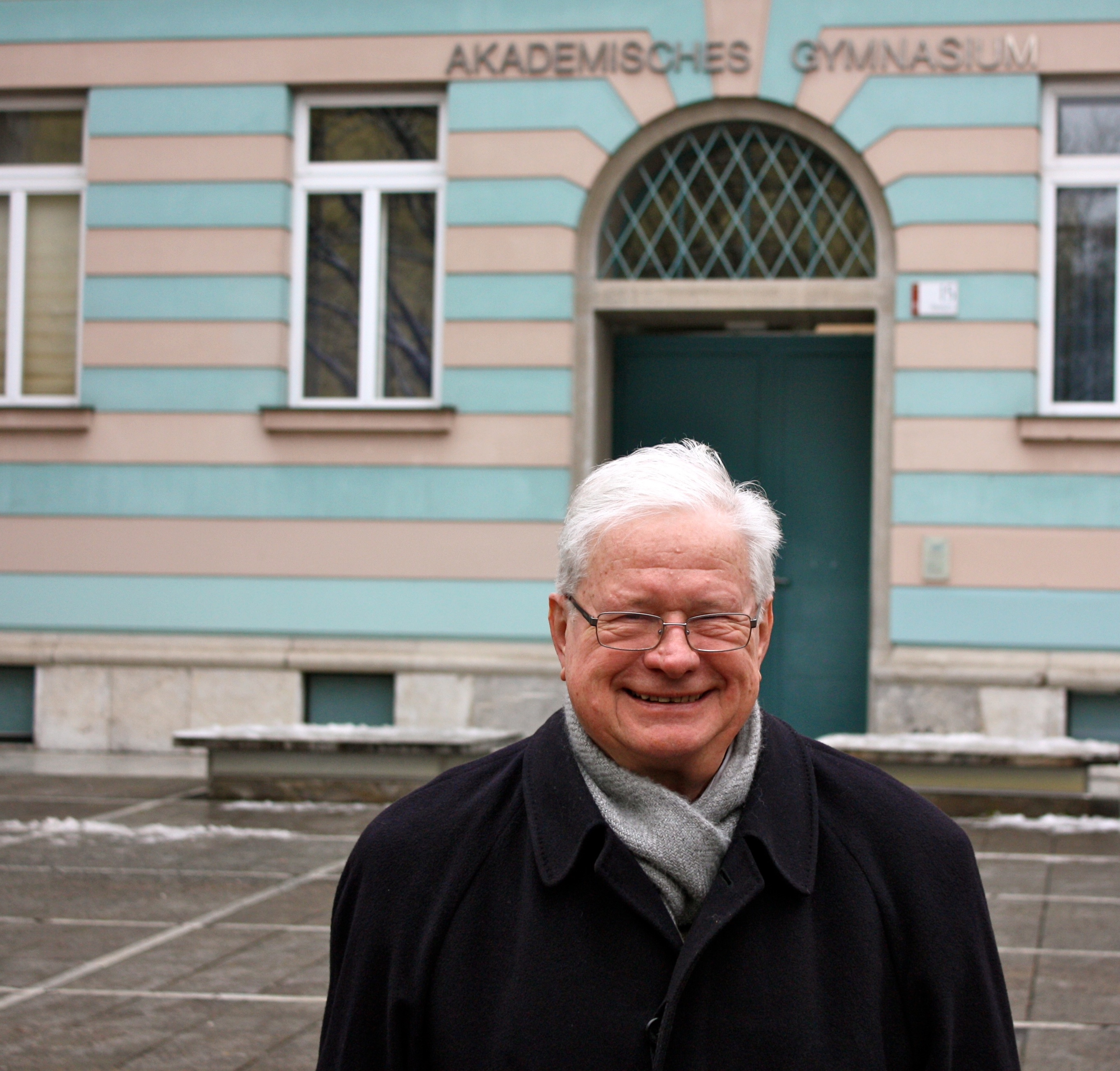 Raoul Kneucker in Graz, an seinem ehemaligen Gymnasium